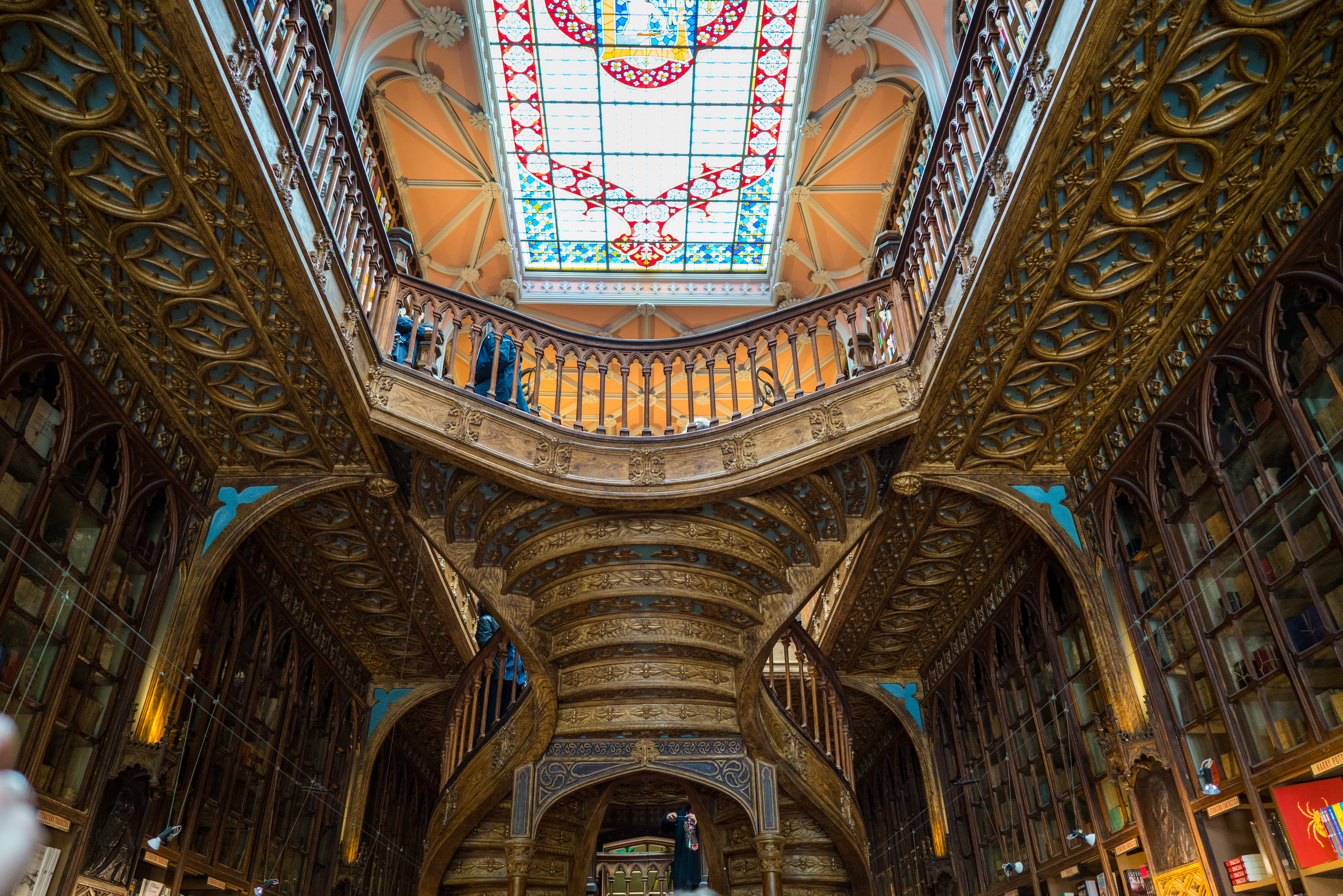 Livraria Lello Bookshop Porto